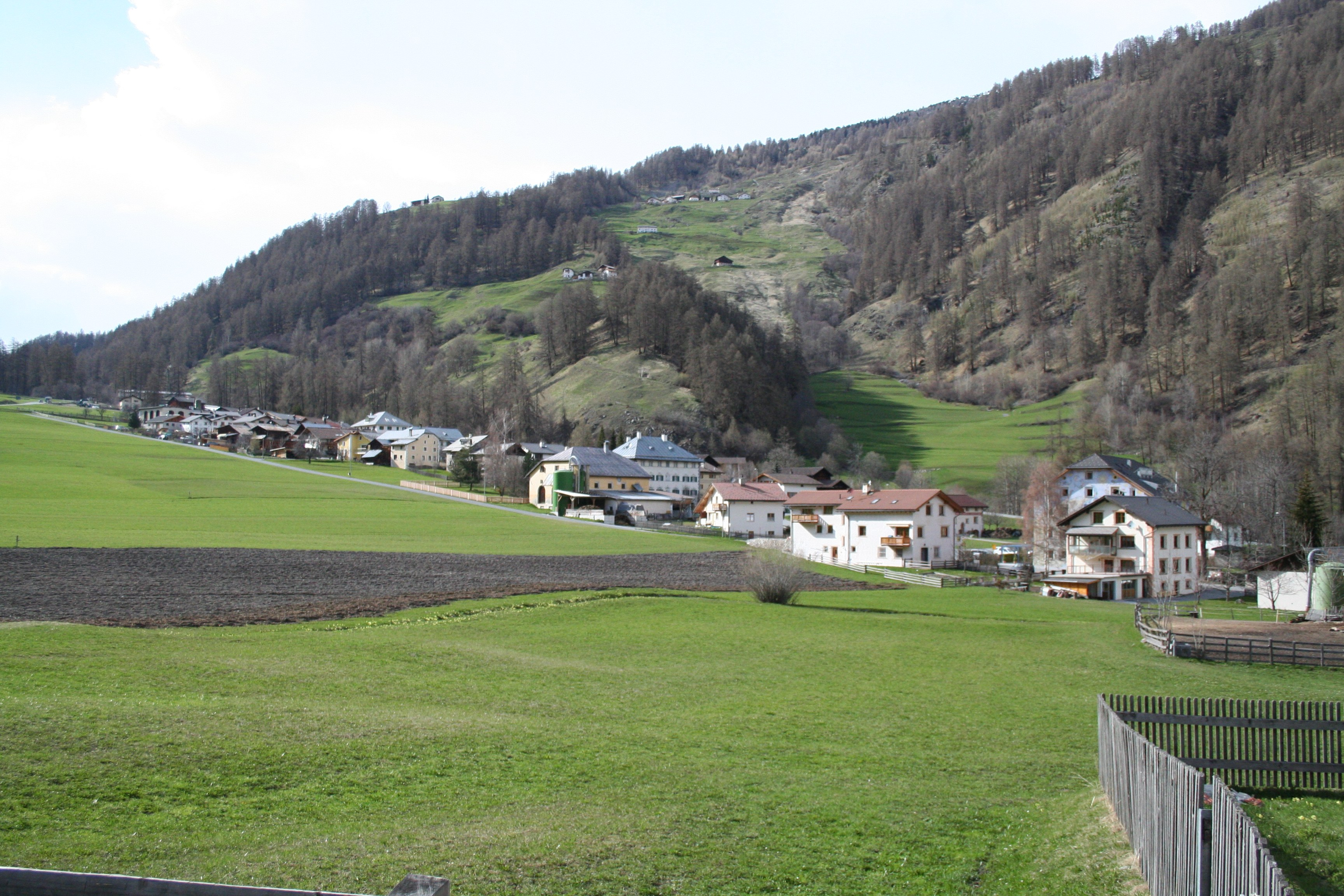 Valchava, nördlicher Dorfteil